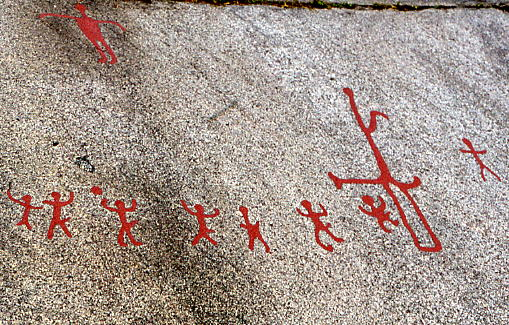 Gravure préhistorique de Tanum, Suède